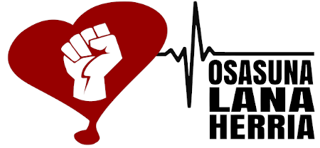 Osasuna Lana Herria ekimenaren logotipoa